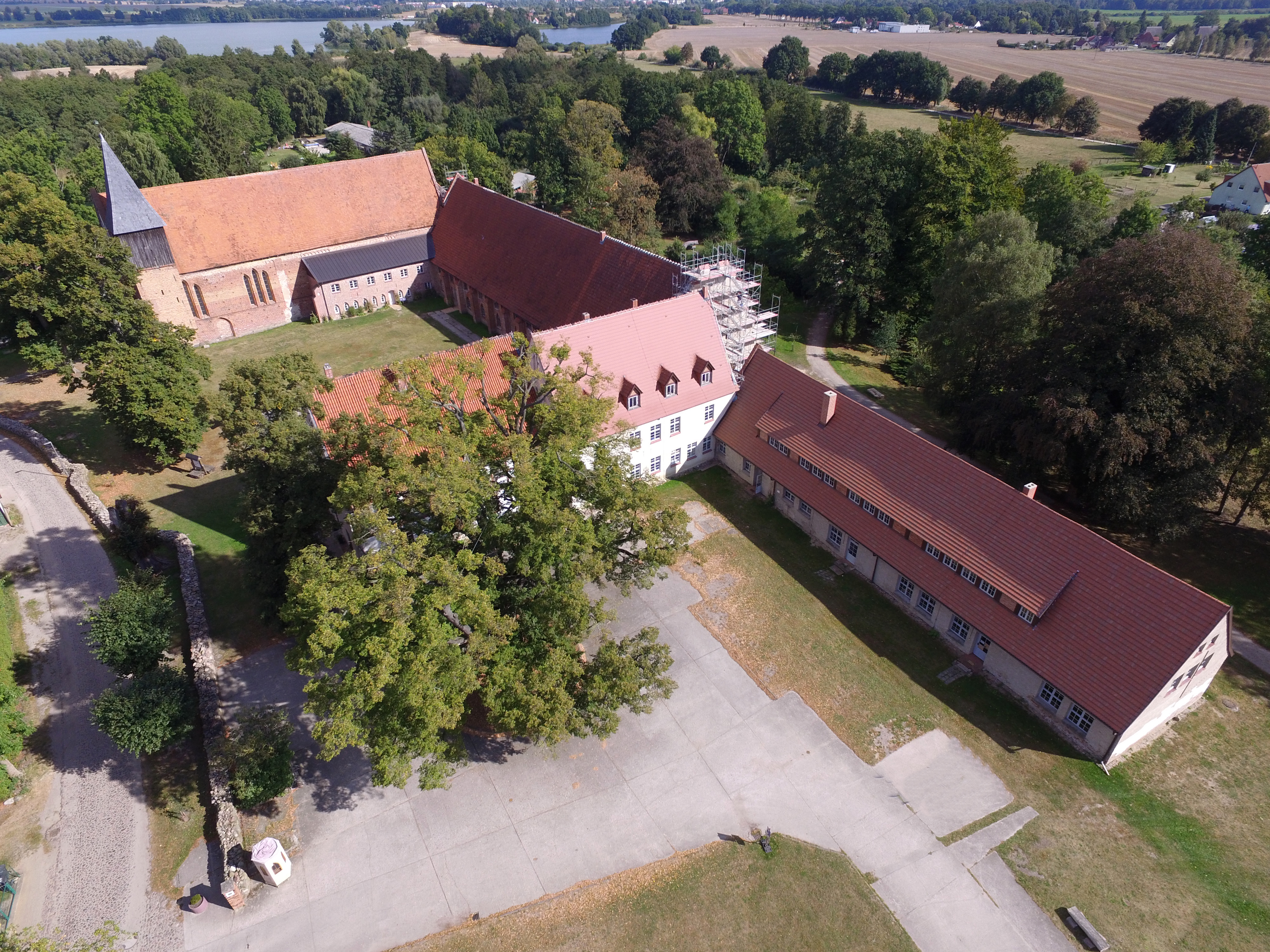 Luftbild des Kloster Rühn